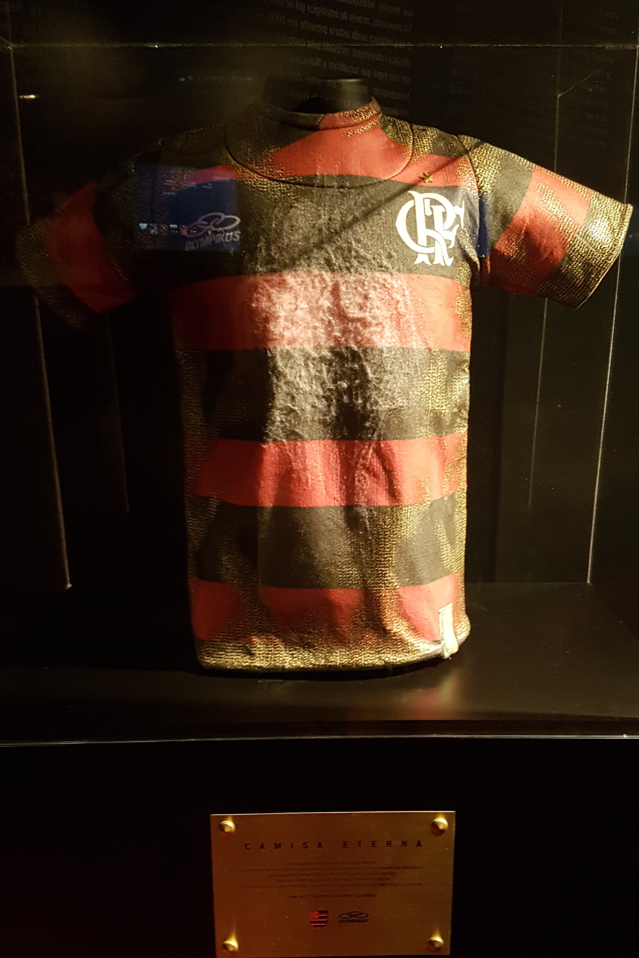 Camisa do Flamengo feito de Kevlar pela Olympikus em exposição na Gávea.